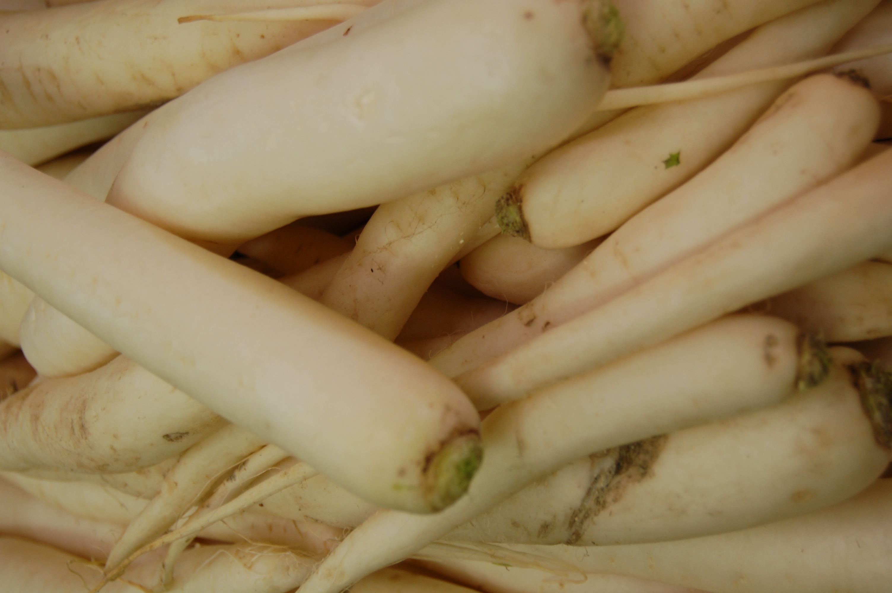 Radis blancs